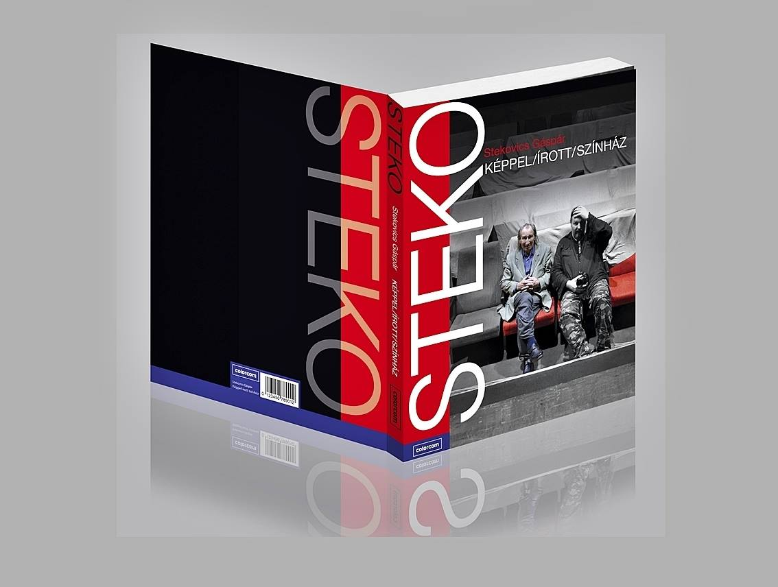 Stekovics Gáspár Képpel írott színház című könyvének borítója